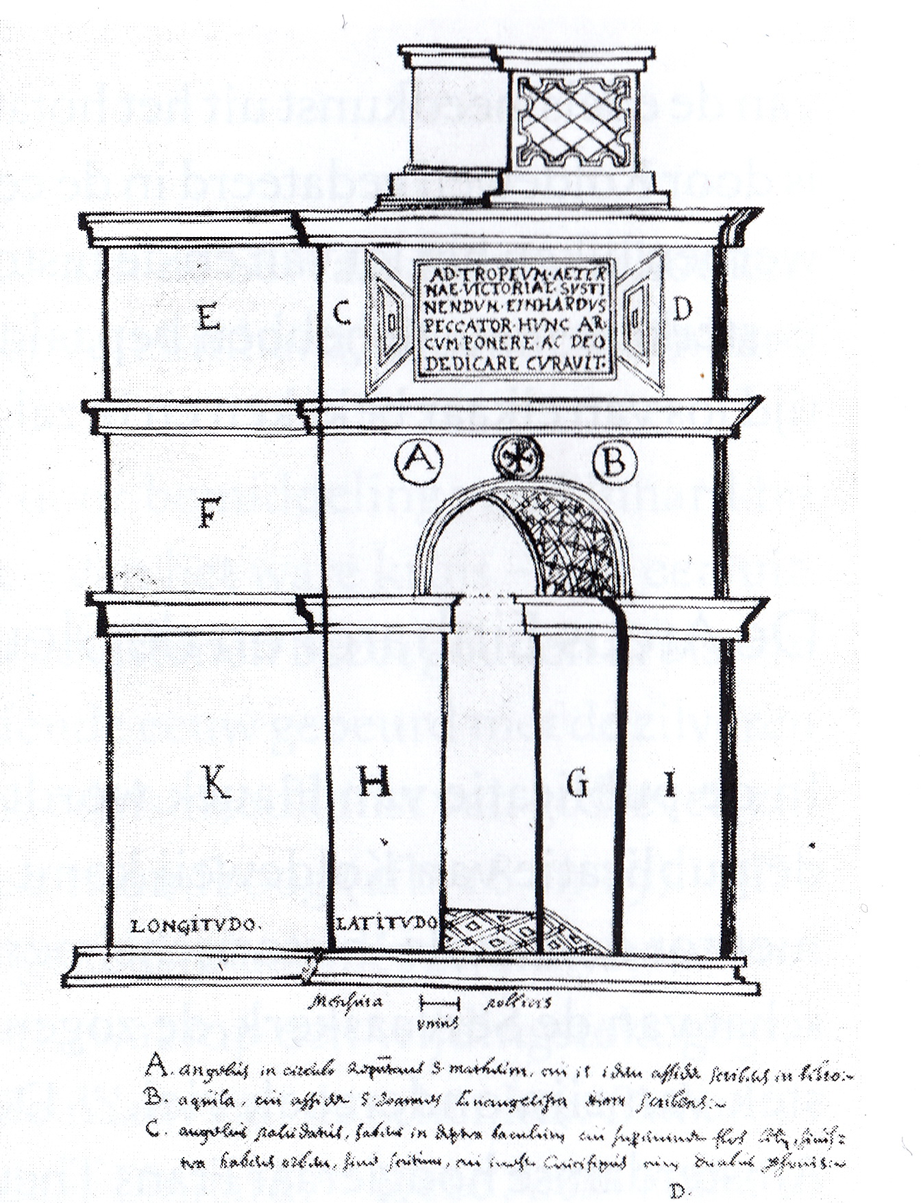 17e-eeuwse tekening van de Arcus Einhardi (Einhardsboog) in Monumenta historiae leodinensis, waarvan een kopie bewaard bleef in de universiteitsbibliotheek van Luik. De Einhardsboog is een verloren gegaan zilveren voetstuk van een reliekenkruis in de vorm van een Romeinse triomfboog. Het kostbare voorwerp ontstond begin 9e eeuw in de Akense werkplaatsen en werd omstreeks 825 door Einhard (volgens het opschrift) geschonken aan de Sint-Servaaskerk in Maastricht. Daar bleef het bijna 1000 jaar bewaard, totdat het in de Franse tijd verloren ging, waarschijnlijk omgesmolten.